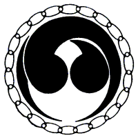 Daimon of Ichiwa-kai